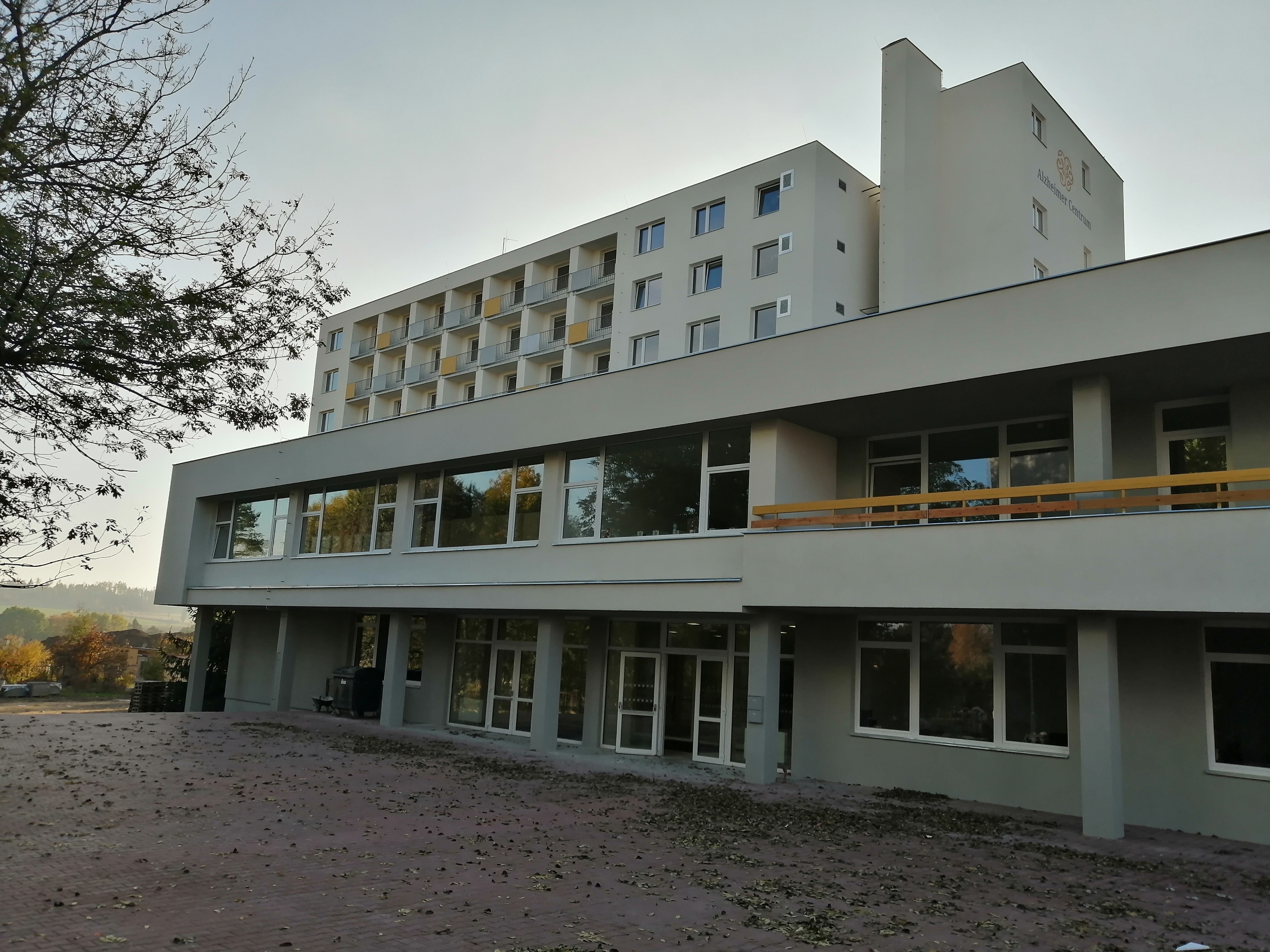 Nově zrekonstruovaná budova Alzheimer centra, Družstevní 1320, Horka-Domky, Třebíč.